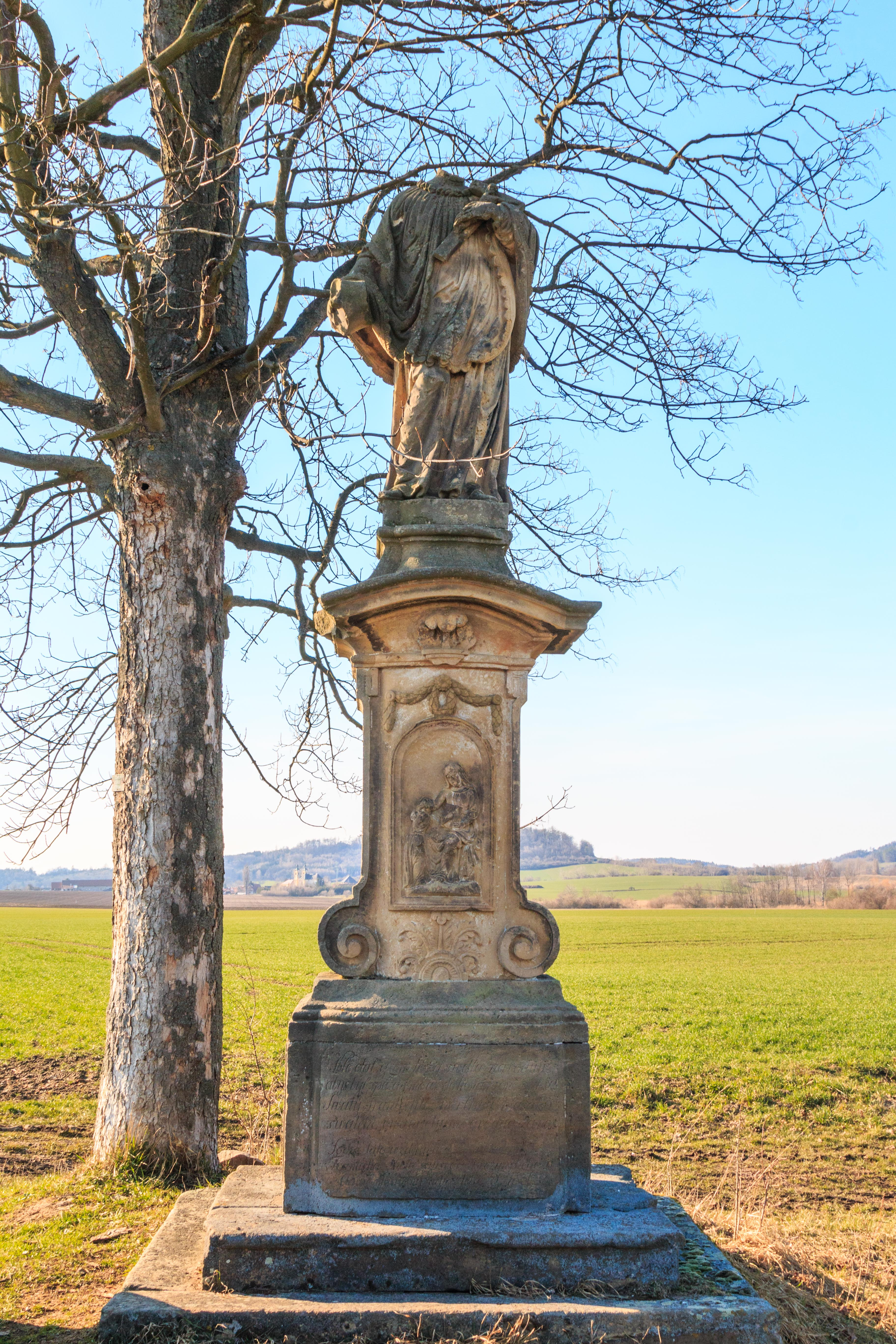 sloup se sochou svatého Františka u Březiny